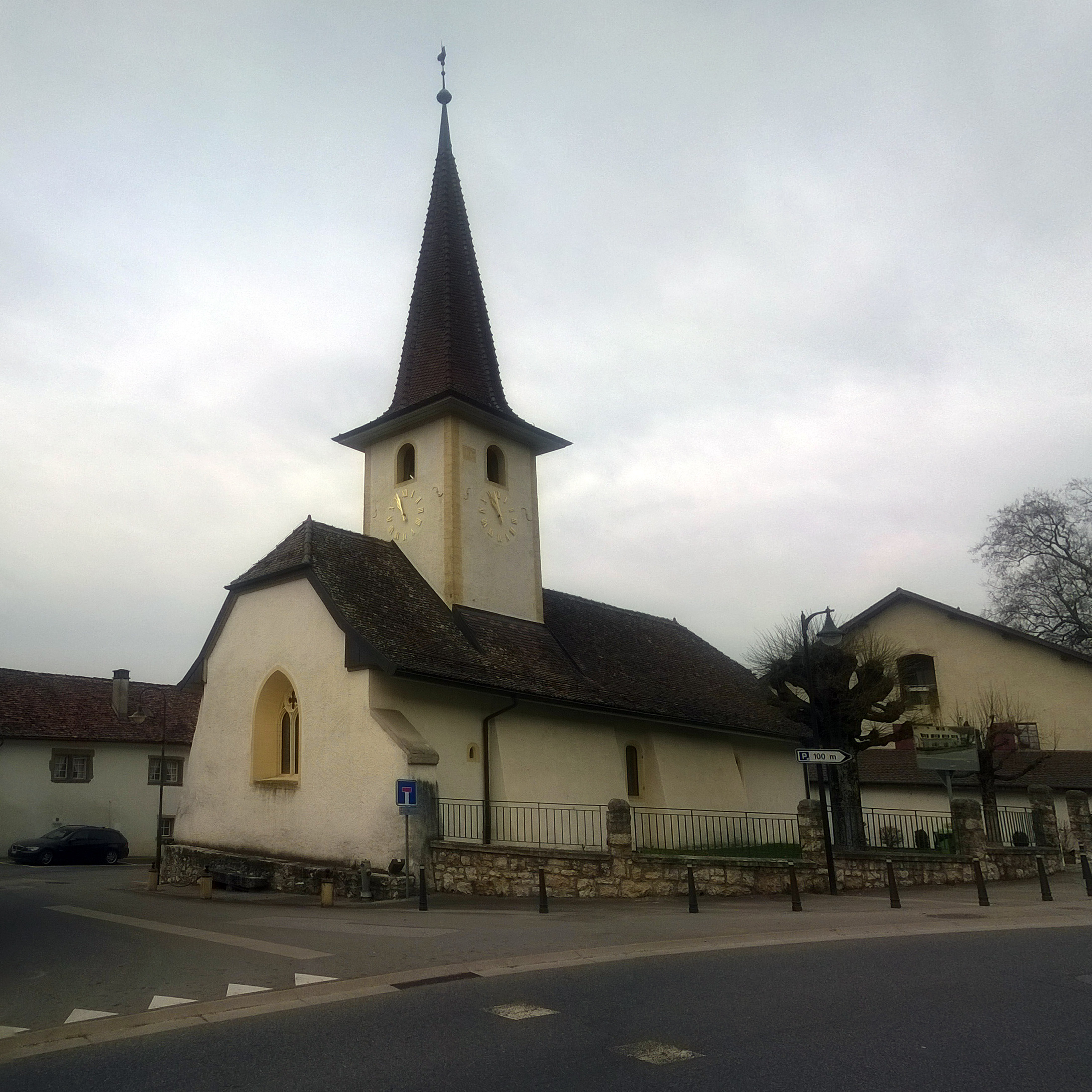 Protestantische Pfarrkirche Éclépens